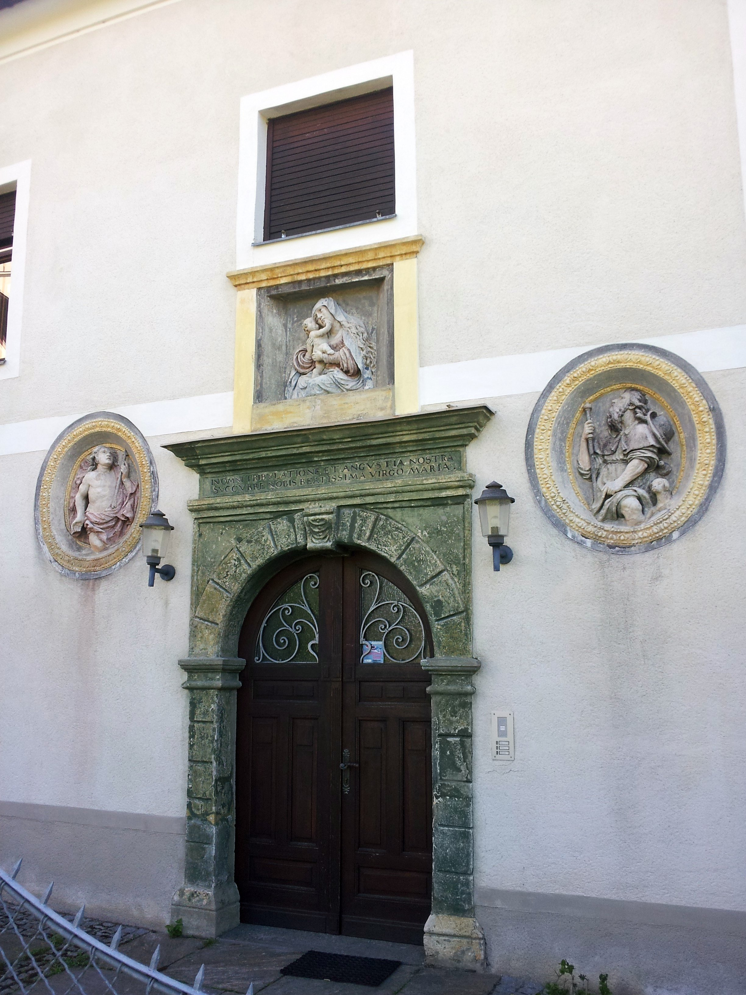 Pfarrhof Hengsberg - Eingangsportal